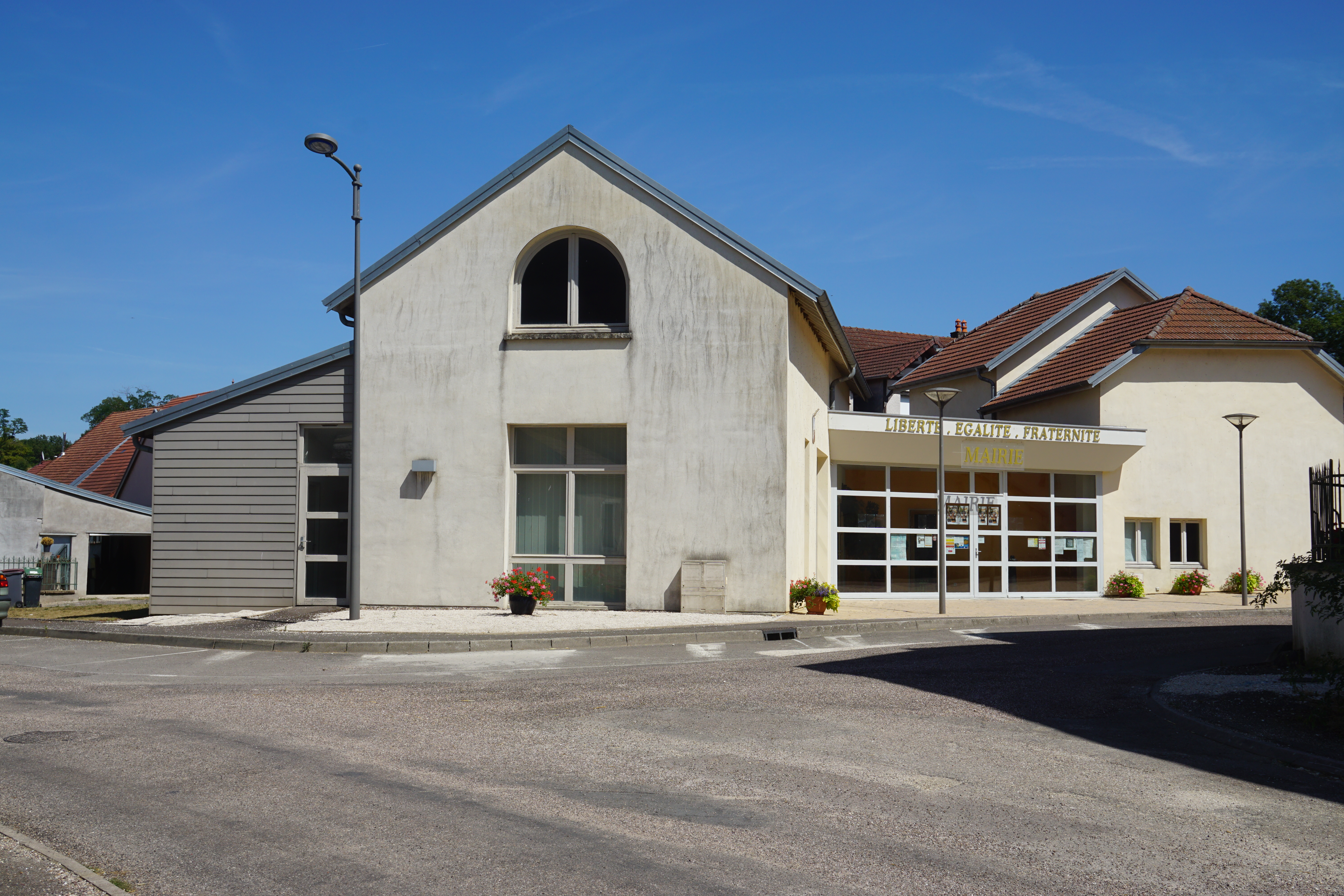 La mairie de Scye.